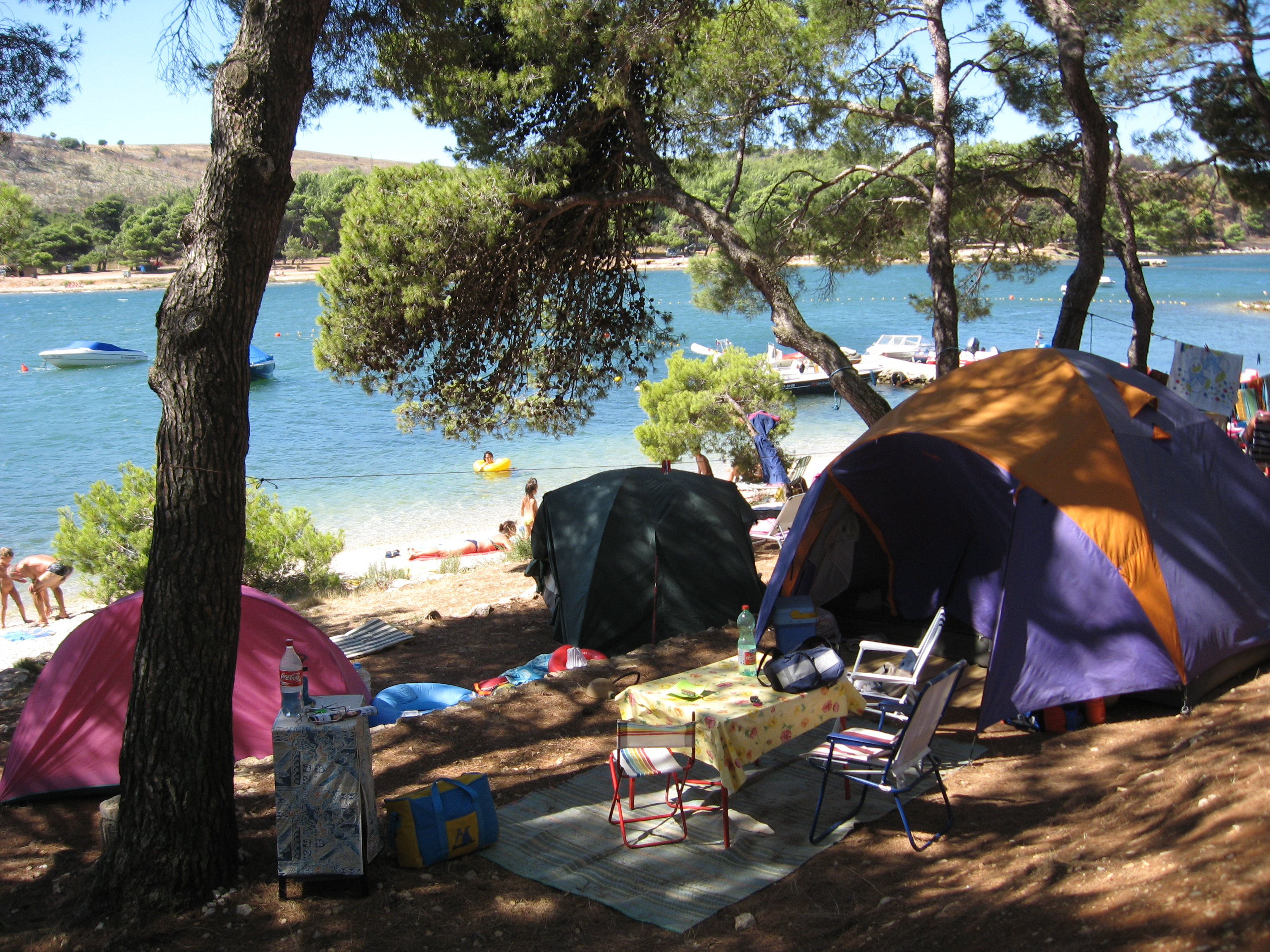 Camping Pomer